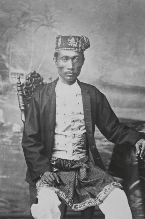 Foto. Studioportret van de sultan van Deli